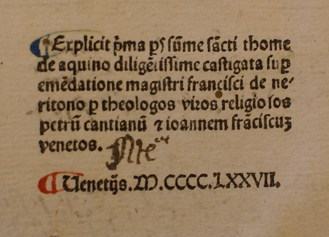 Incunable de la Summa Theologica, Venise, 1477. Colophon. Source Queen's University (Canada)